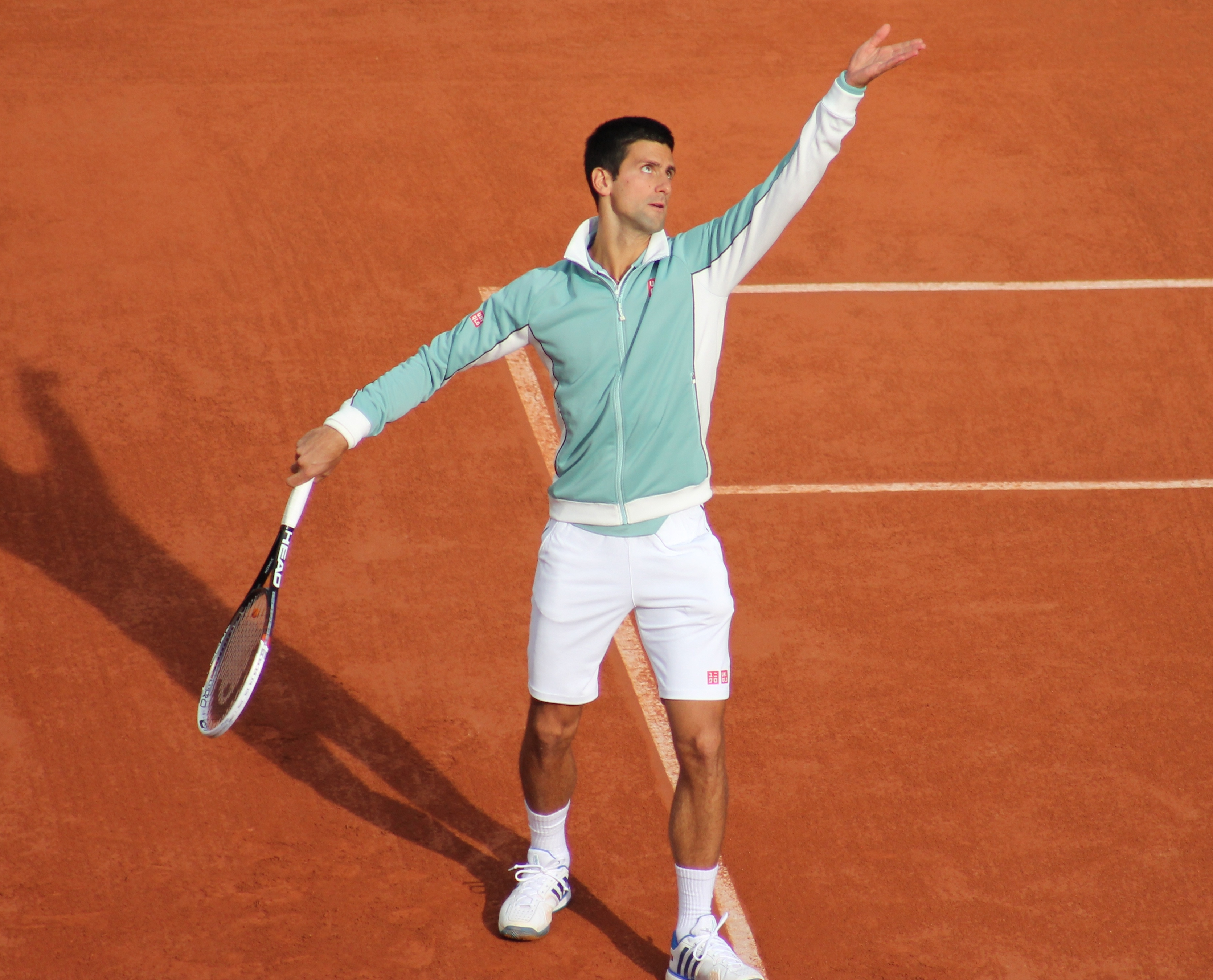 Djokovic RG13 (16)